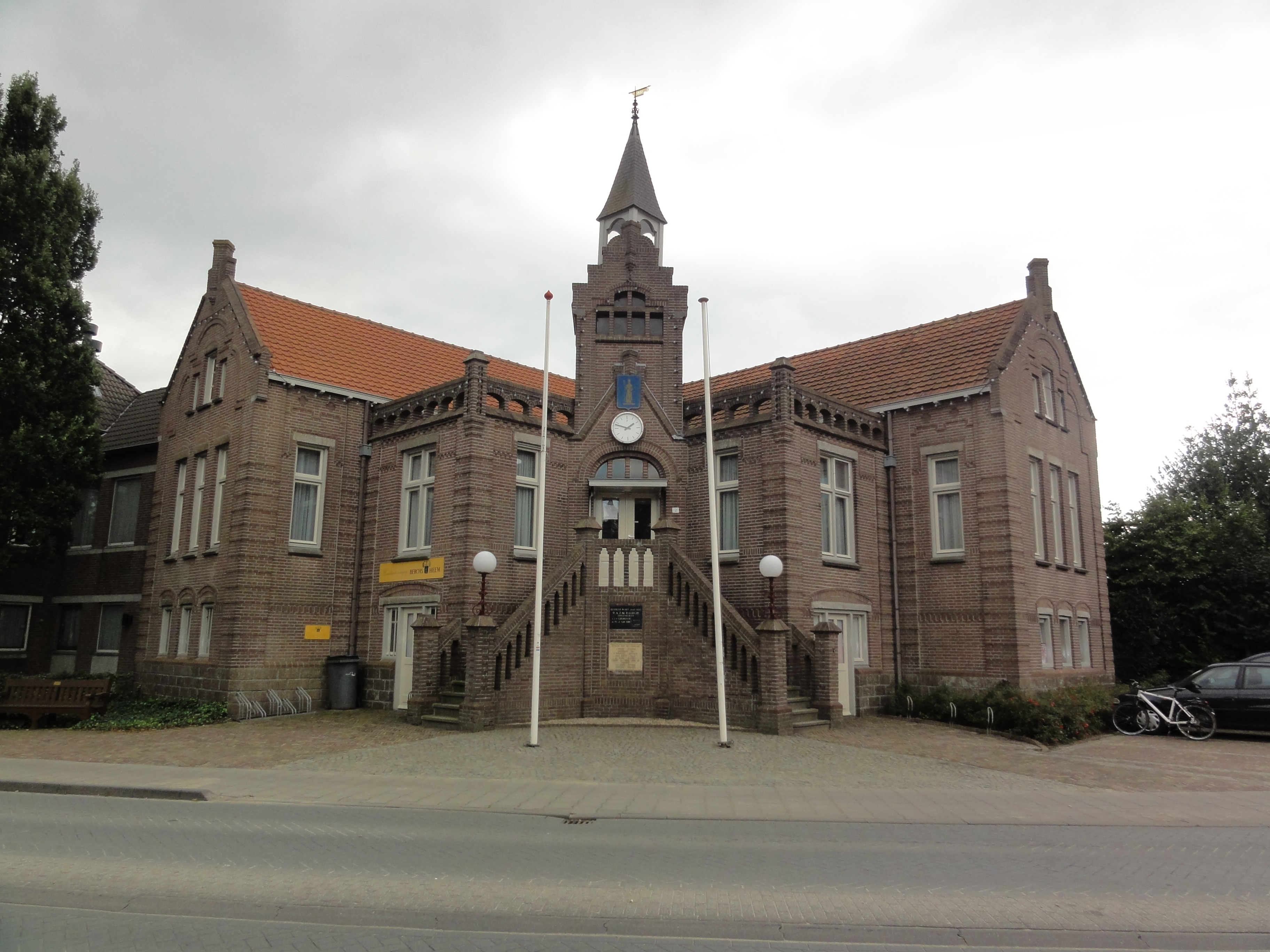 Berghem Rijksmonument 516597 Burg.v.Erpstraat 2, voormalig gemeentehuis 78″ N, 5° 33′ 54.49″ E Object location51° 46′ 26.92″ N, 5° 33′ 56.08″ E